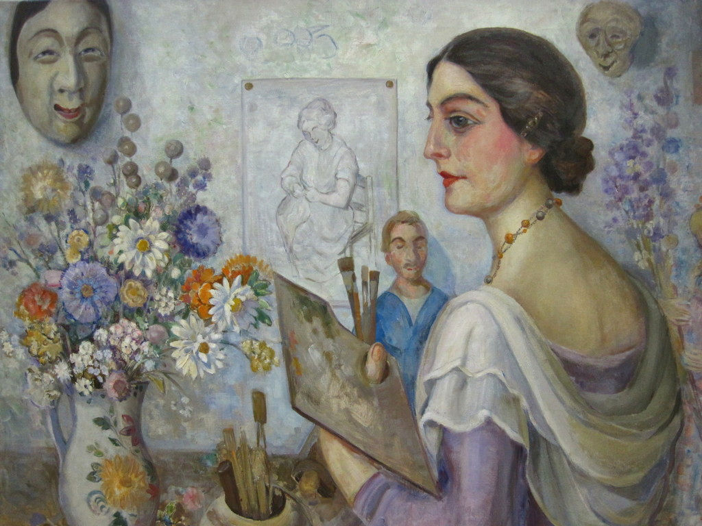 Zelfportret (ca. 1900) van Charlotte Pothuis